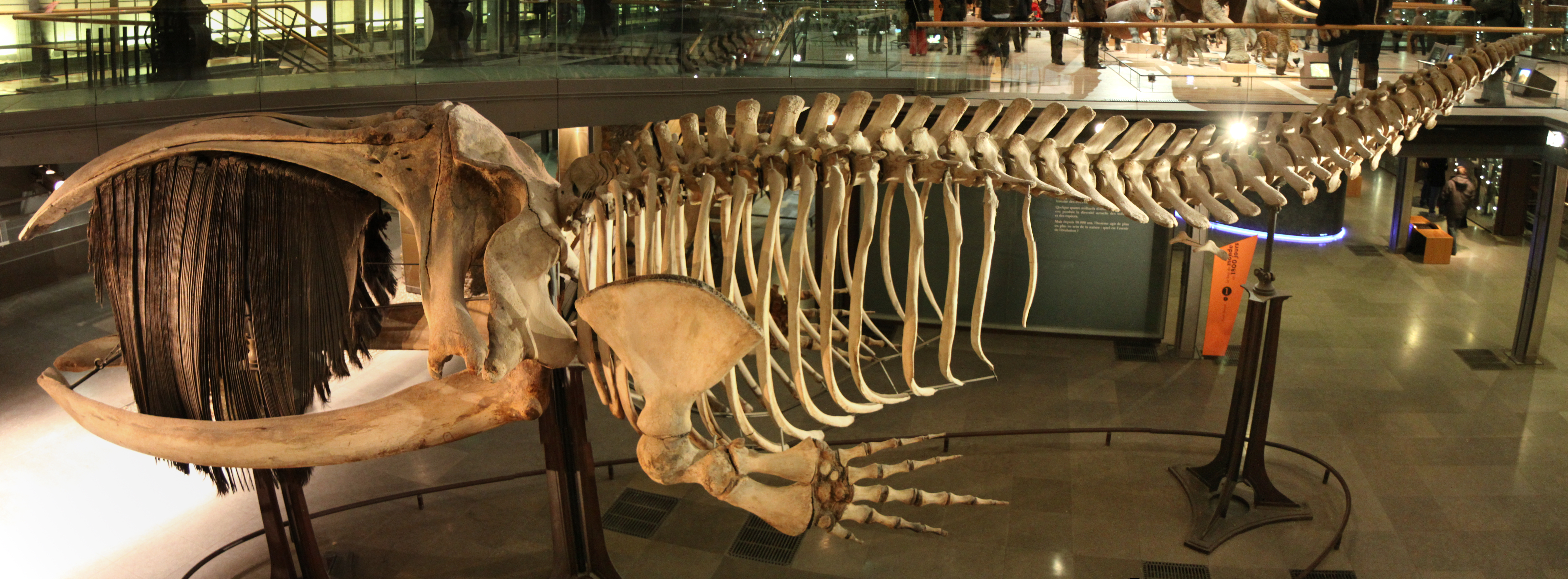 Un squelette de baleine australe dans la grande galerie de l'Évolution, à Paris.